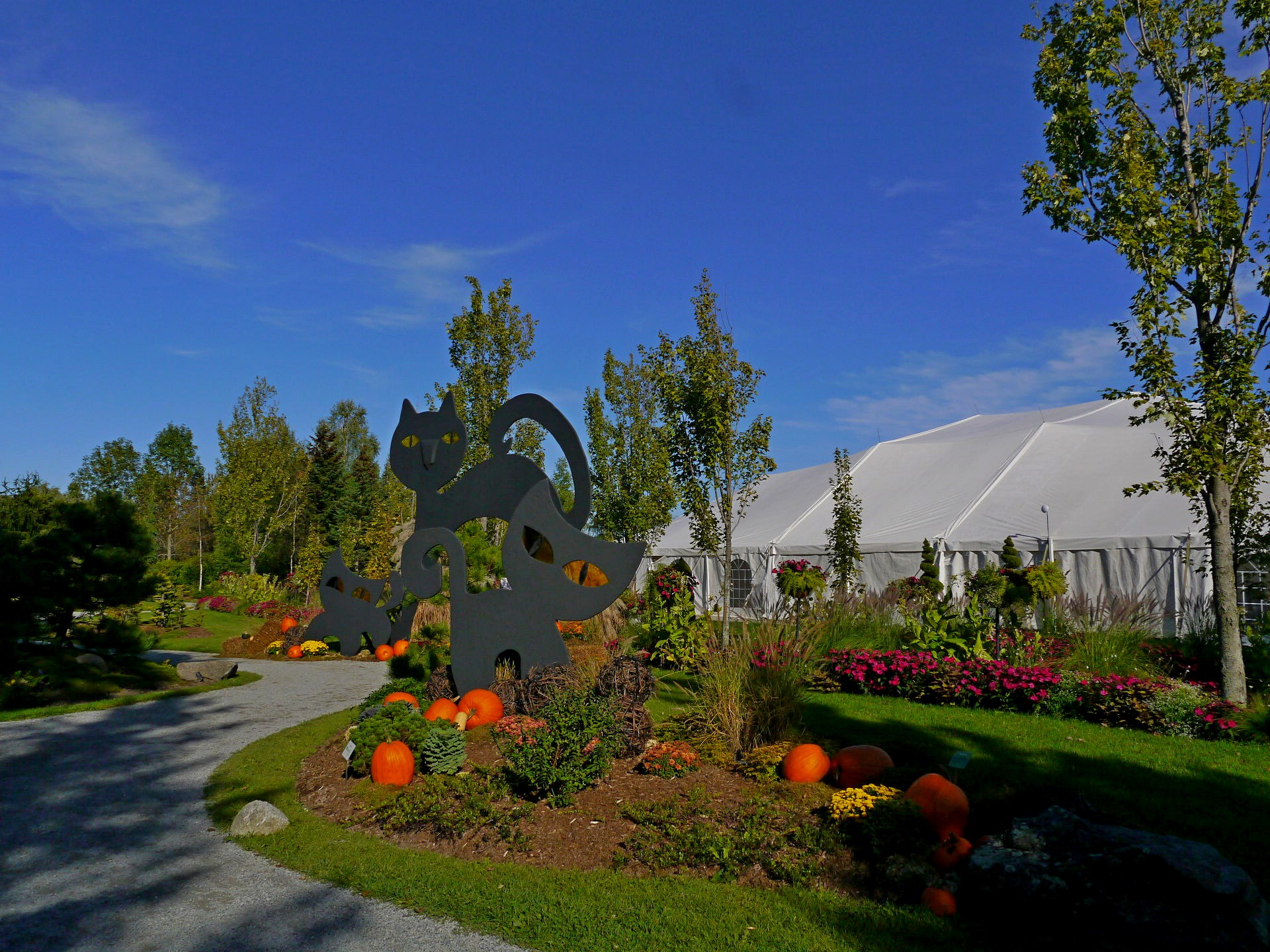 Décorations d'automne sur le sentier des curiosités au Parc Marie-Victorin de Kingsey Falls, Québec.